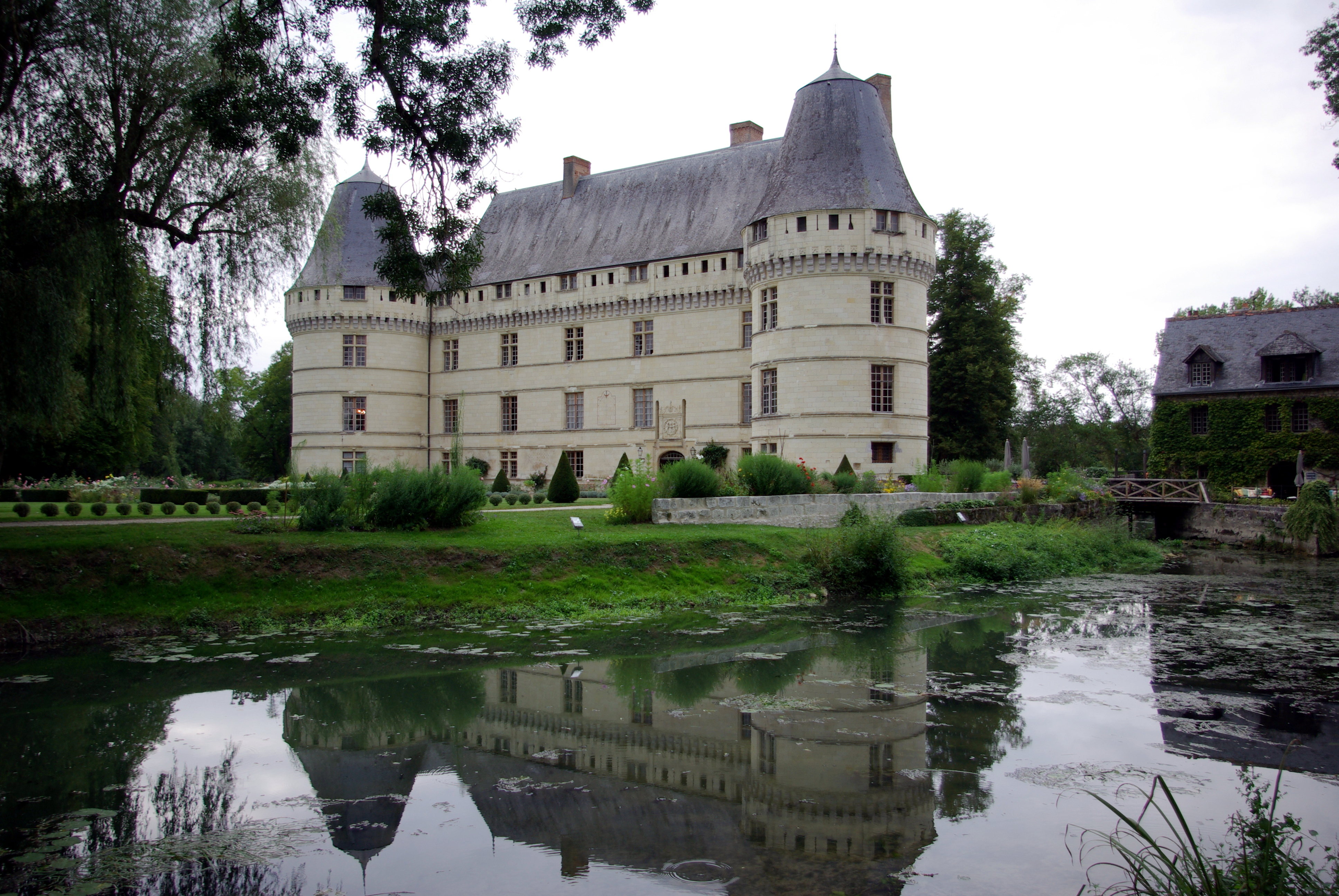 Château de l'Islette et son reflet dans un bras de l'Indre - Azay-le-Rideau .